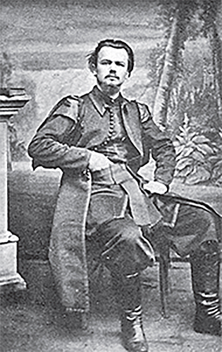 Беларуская (тарашкевіца): Партрэт Яўстаха Козела Паклеўскага (Jaŭstach Kozieł Pakleŭski), удзельніка паўстаньня 1863—1864 гадоў